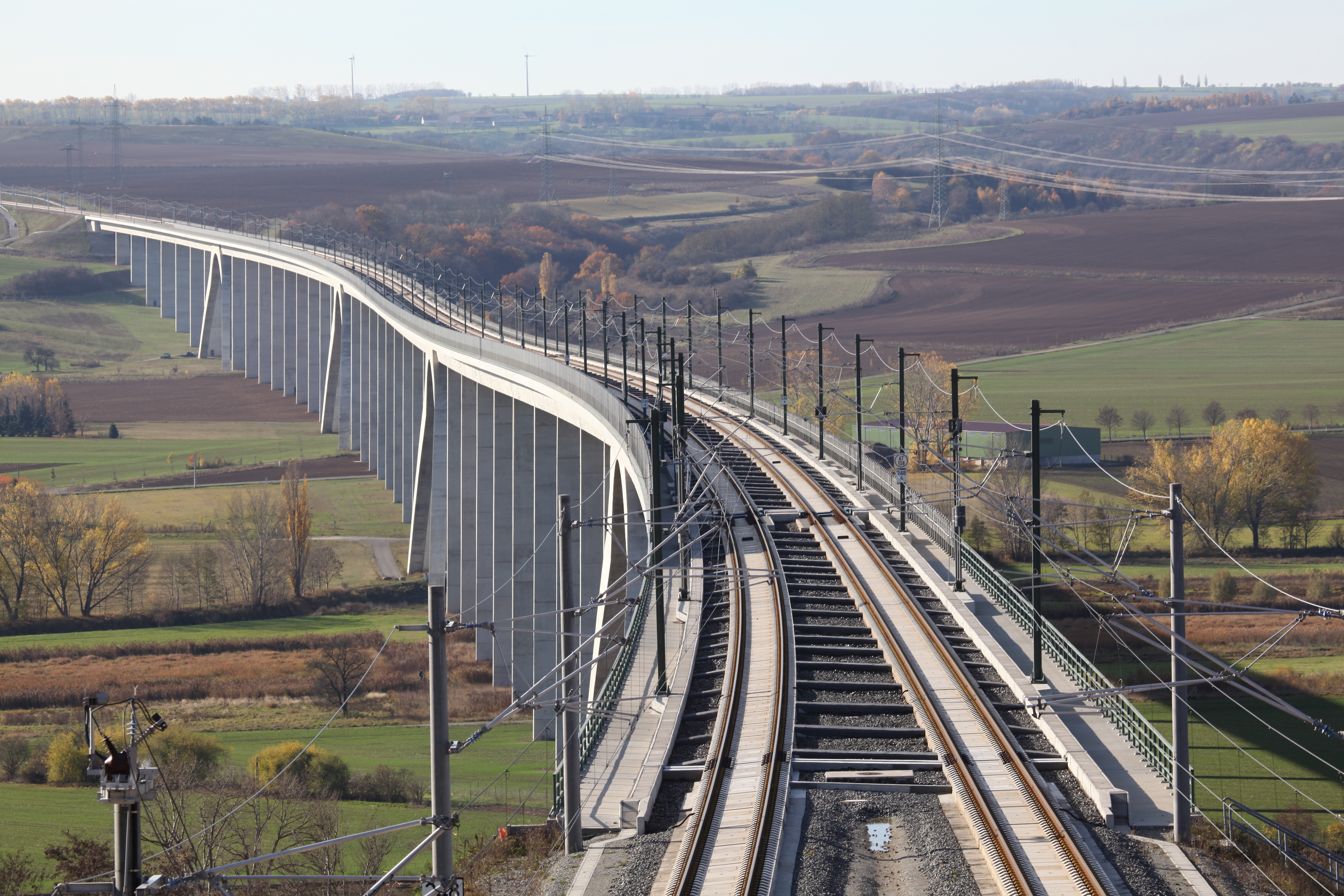 Unstruttalbrücke